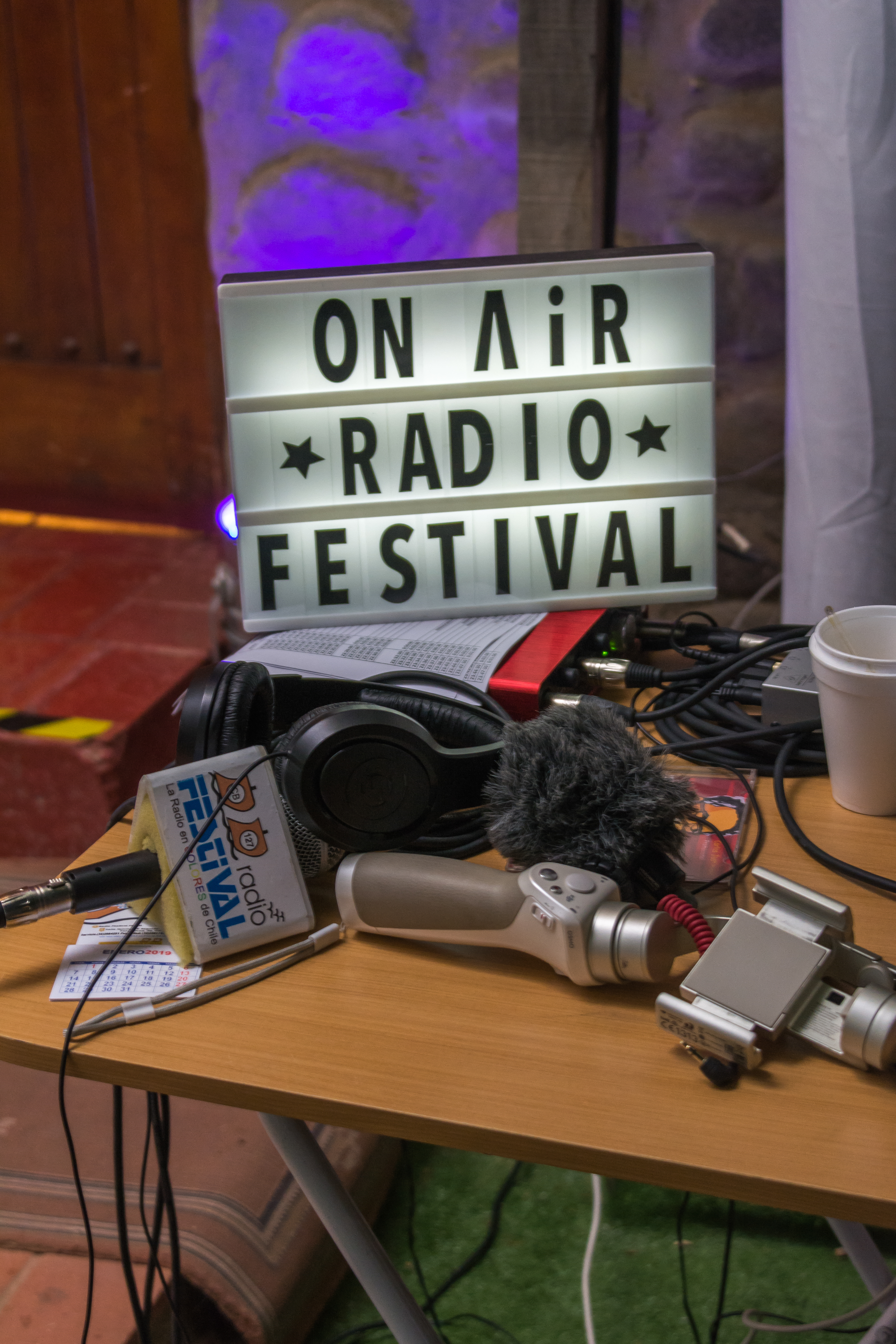 Festival del Huaso de Olmué 2019, Olmué, Región de Valparaíso, Chile.